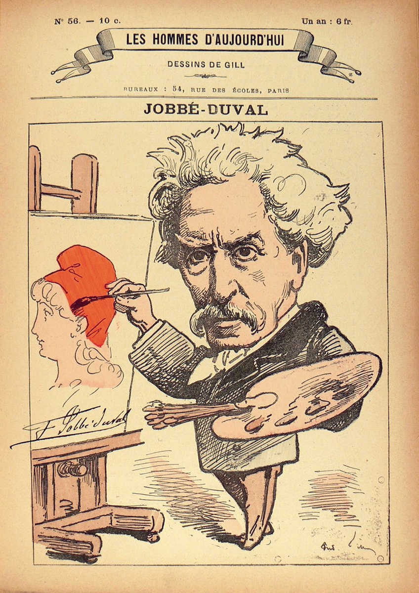 Félix Marie Jobbé-Duval par André Gill, Les Hommes d'aujourd'hui N°56 (vers 1880)